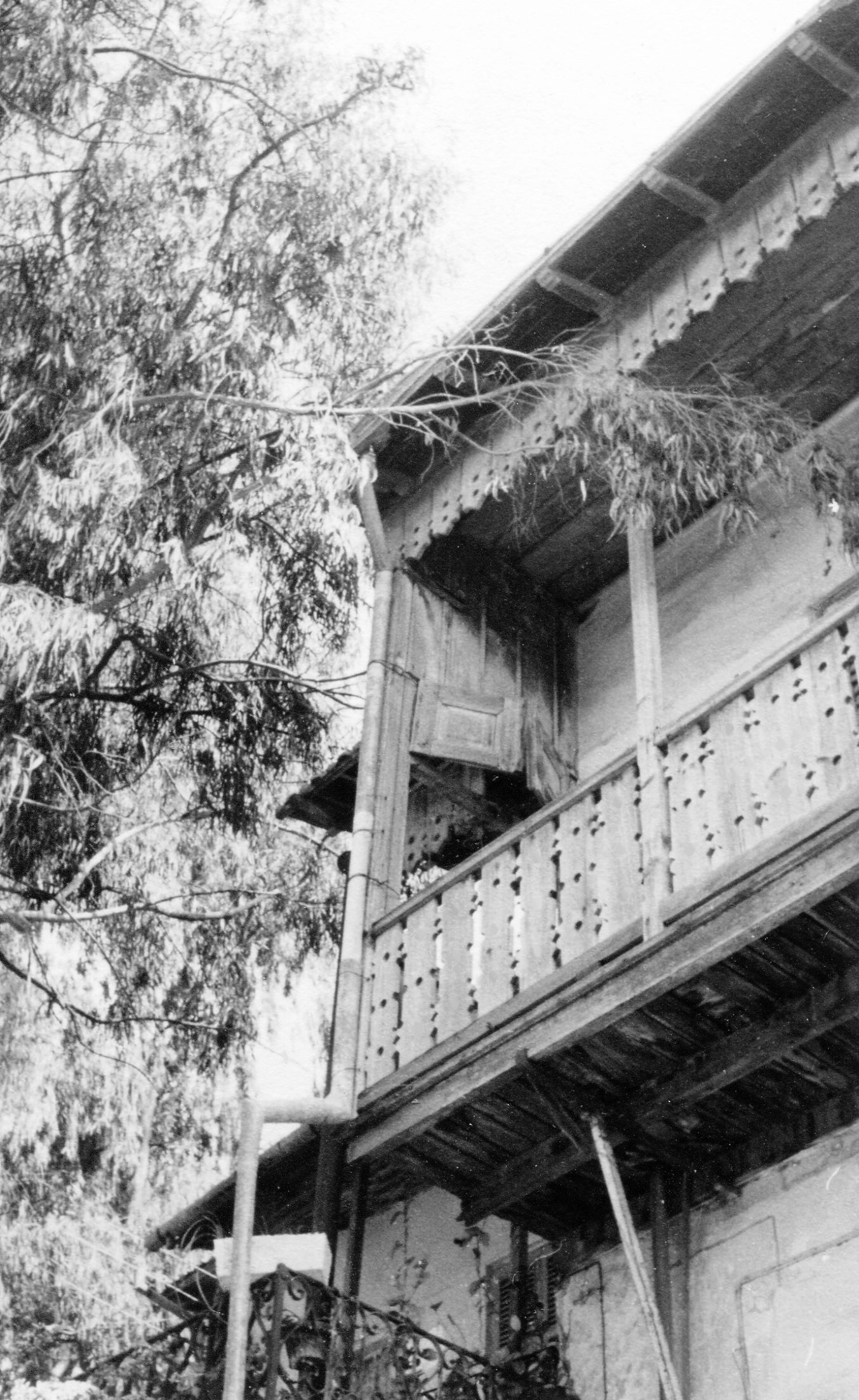 ביתו של הפקיד הראשי של הברון רוטשילד This is a photo of a heritage building in Israel. Its ID is 9-8300-023